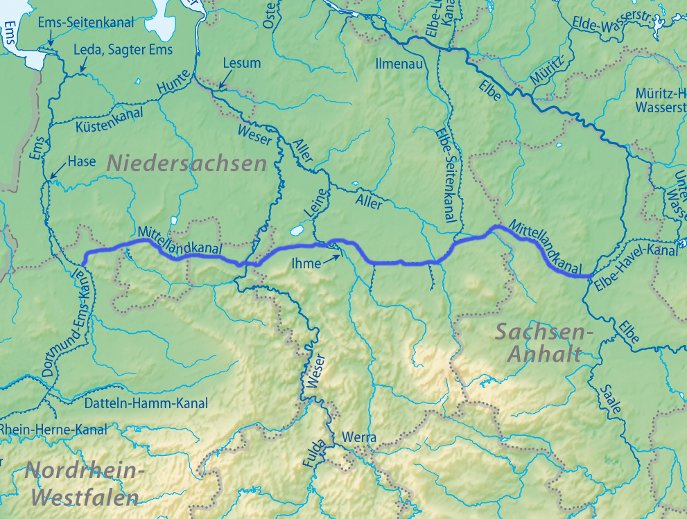 Verlauf des Mittellandkanals